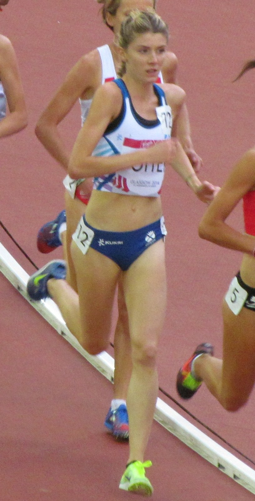 Beth Potter 10,000 m 2014 Commonwealth Games.